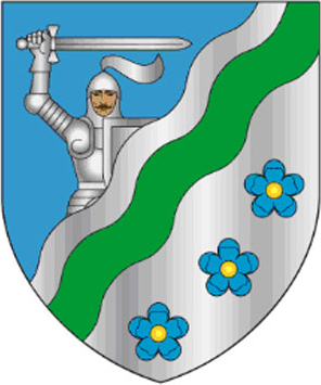 Герб Магілёўскага раёна